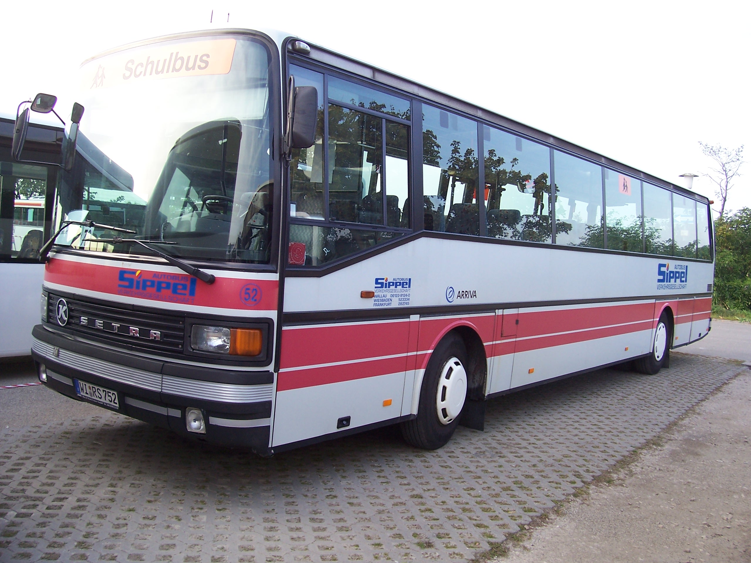 Ein Setra-Bus von Autobus Sippel anläßlich einer Veranstaltung/Sonderfahrt in Mannheim